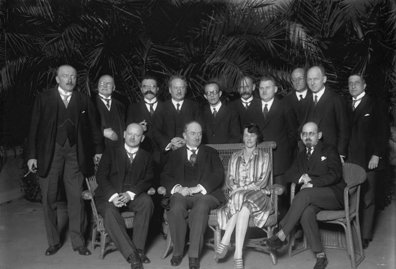 Der deutsche Reichsaussenminister und Friedens-Nobel-Preisträger Dr. Stresemann gestorben! Aus dem Wirken des Reichsaussenministers Dr. Stresemann! Reichsaussenminister Dr. Stresemann und der russische Aussenminister Tschitscherin, Frau Stresemann und der russische Botschafter Krestinski während des Besuches des russischen Aussenministers in Berlin.